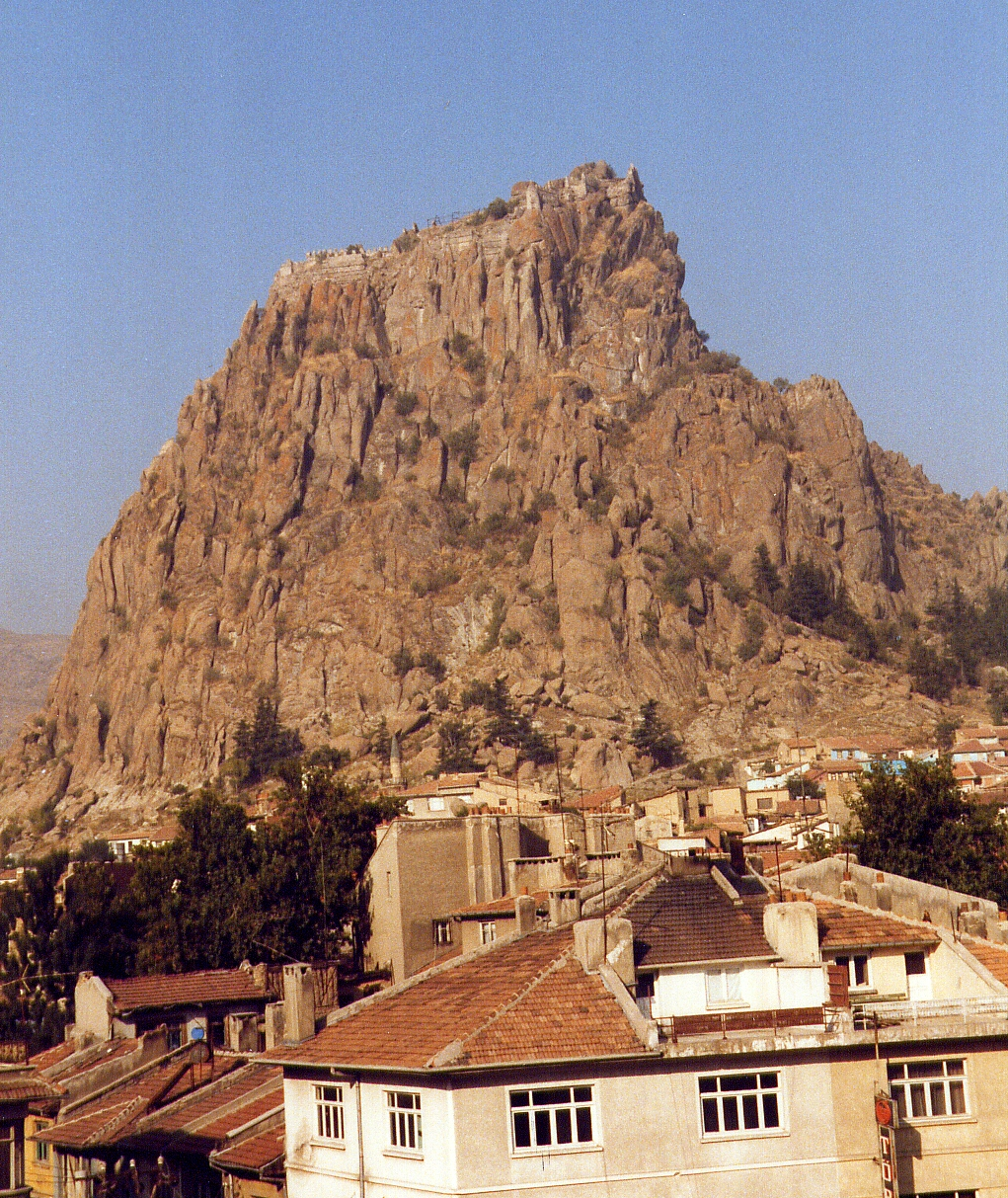 Burgberg von Afyonkarahisar, Zentraltürkei